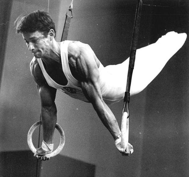 ADN-ZB-Koard-21.6.74-ba Berlin: DDR-Meisterschaften im Turnen- Nach der ersten Kur bei den DDR-Meisterschaften im Turnen, die in Berlin ausgetragen werden, liegt der 32 fache DDR-Meister Klaus Köste vom SC DHfK Leipzig an dritter Position. Unser Foto zeigt ihn bei seiner Kür an den Ringen.